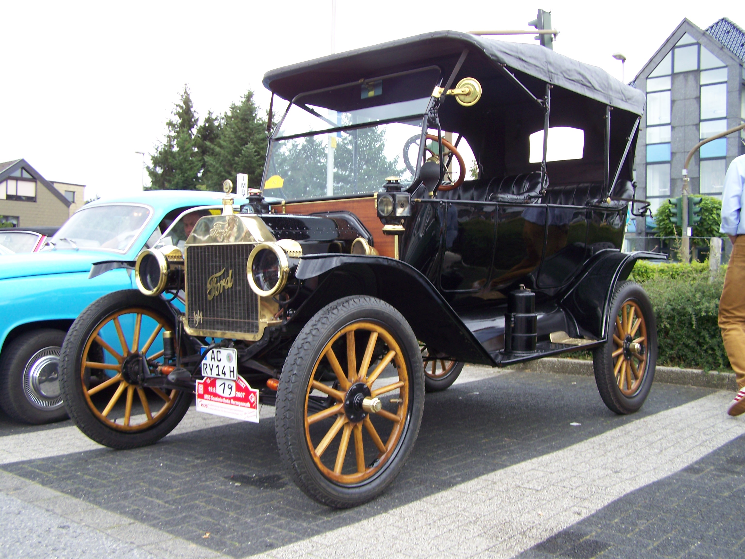 Ford Modell T - 1914, in Herzogenrath